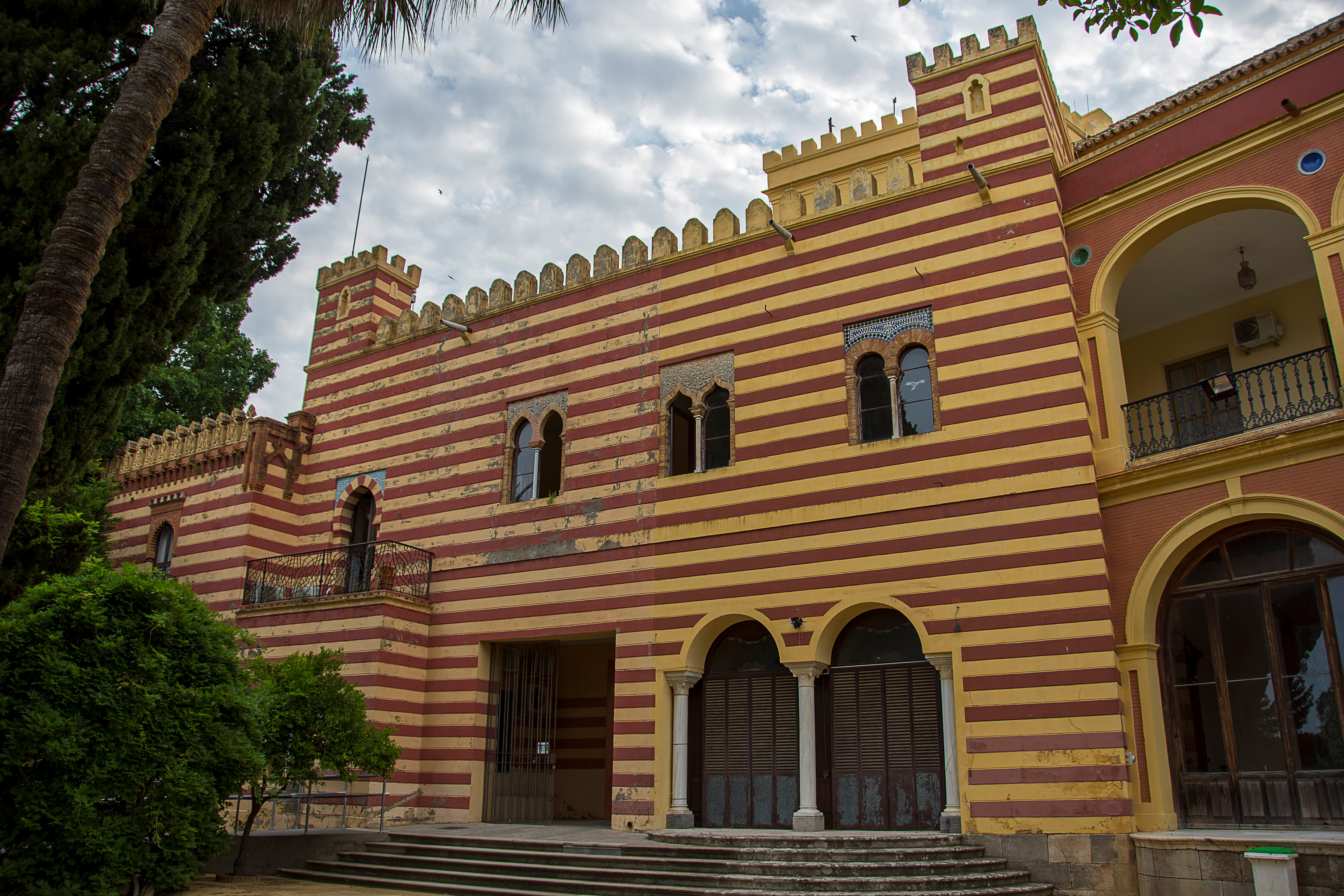 Palacio de Orleans y Borbón (Sanlúcar de Barrameda).